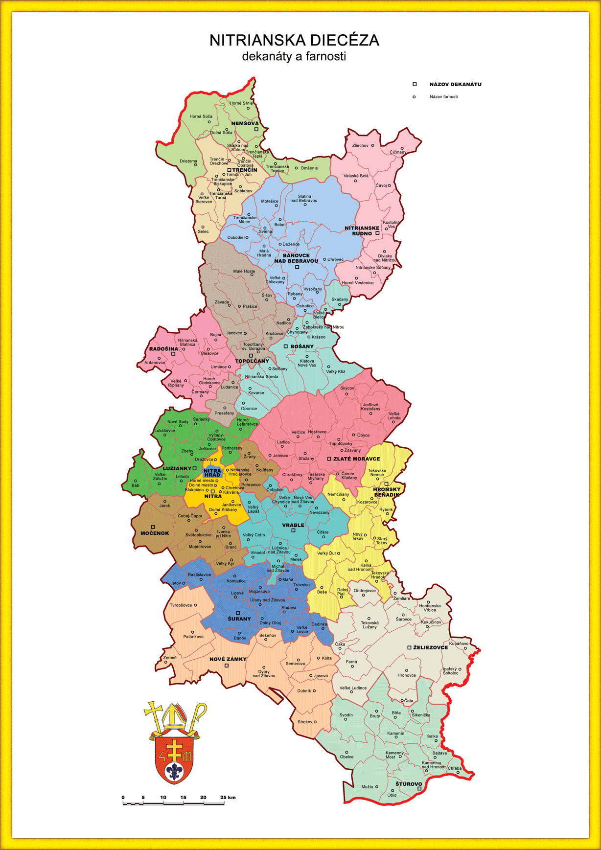 Bistum Neutra nach 2008